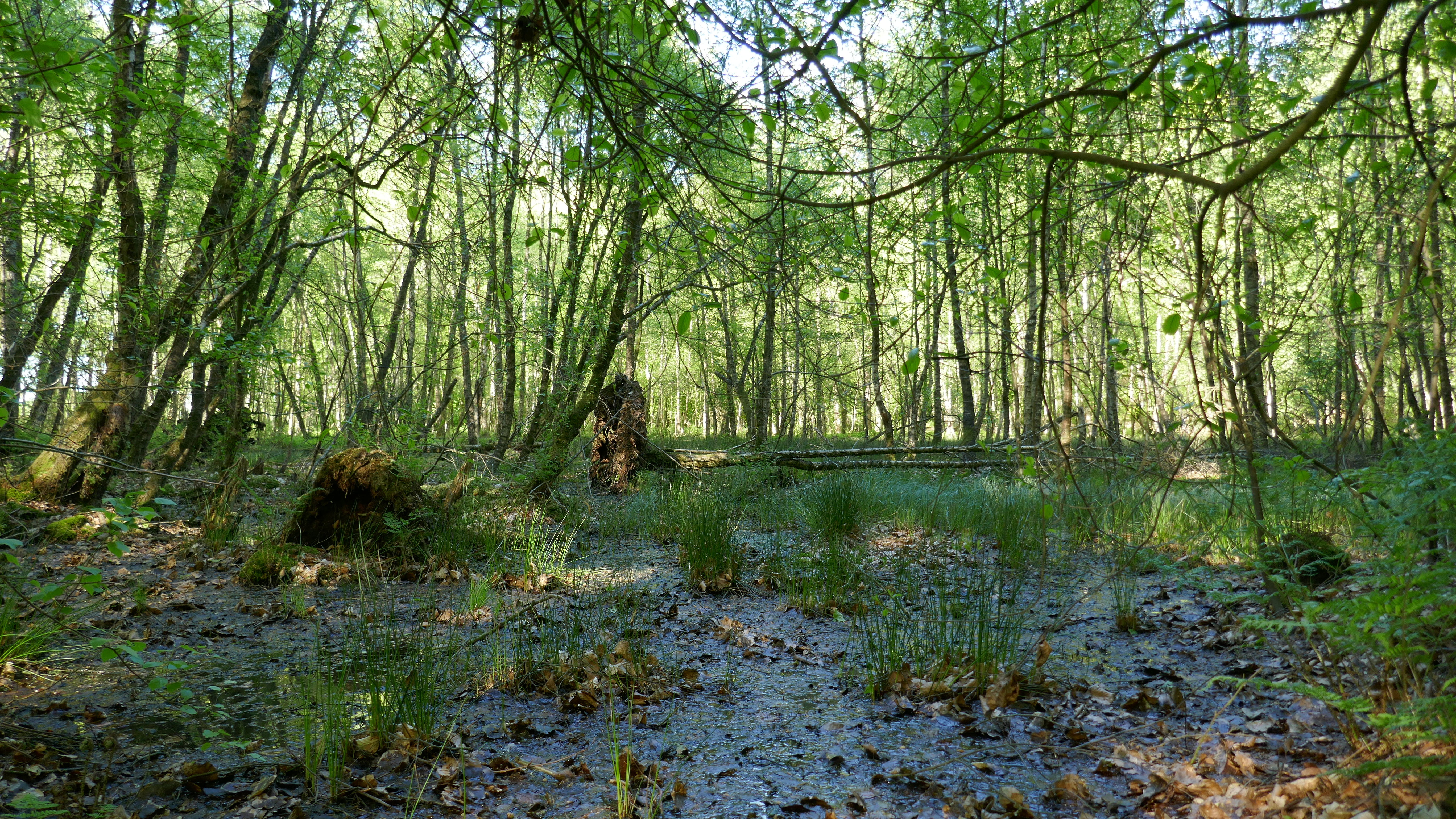 Naturdenkmal ND138 Schlatt im Stühe in der Gemeinde Dötlingen, Landkreis Oldenburg, Niedersachsen